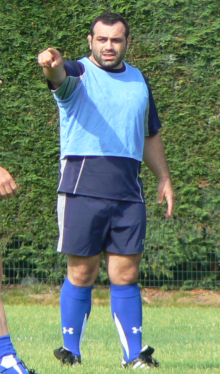 Le rugbyman géorgien Davit Zirakashvili lors d'un entrainement avec l'ASM Clermont Auvergne.